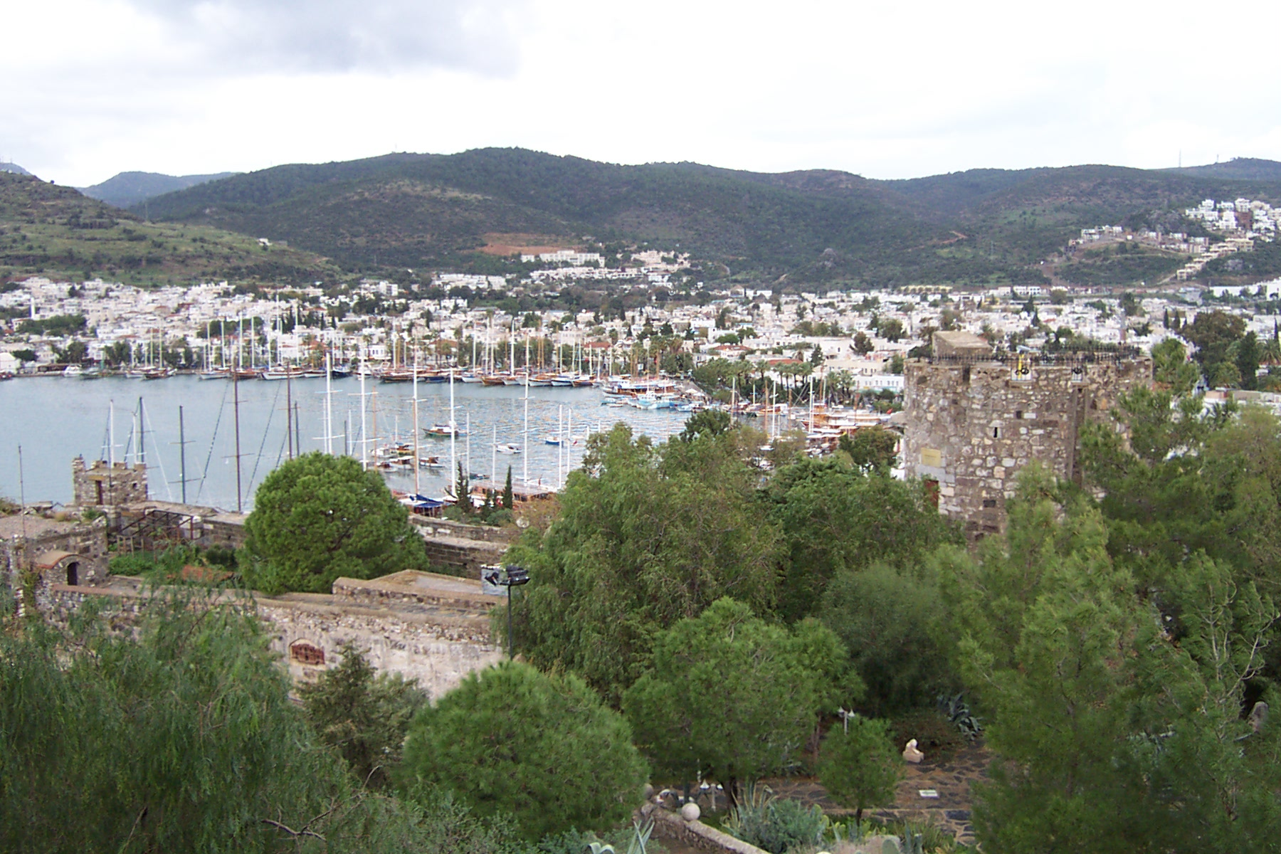 Sicht auf den Jachthafen von Bodrum vom Kastell aus Copyright Status: GNU Freie Dokumentationslizenz